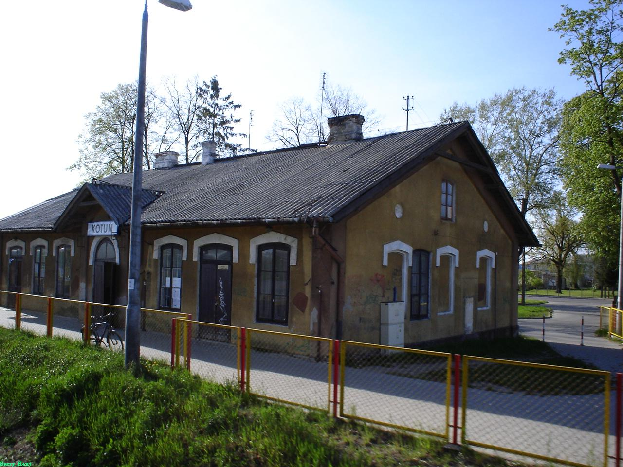 Przystanek kolejowy w Kotuniu